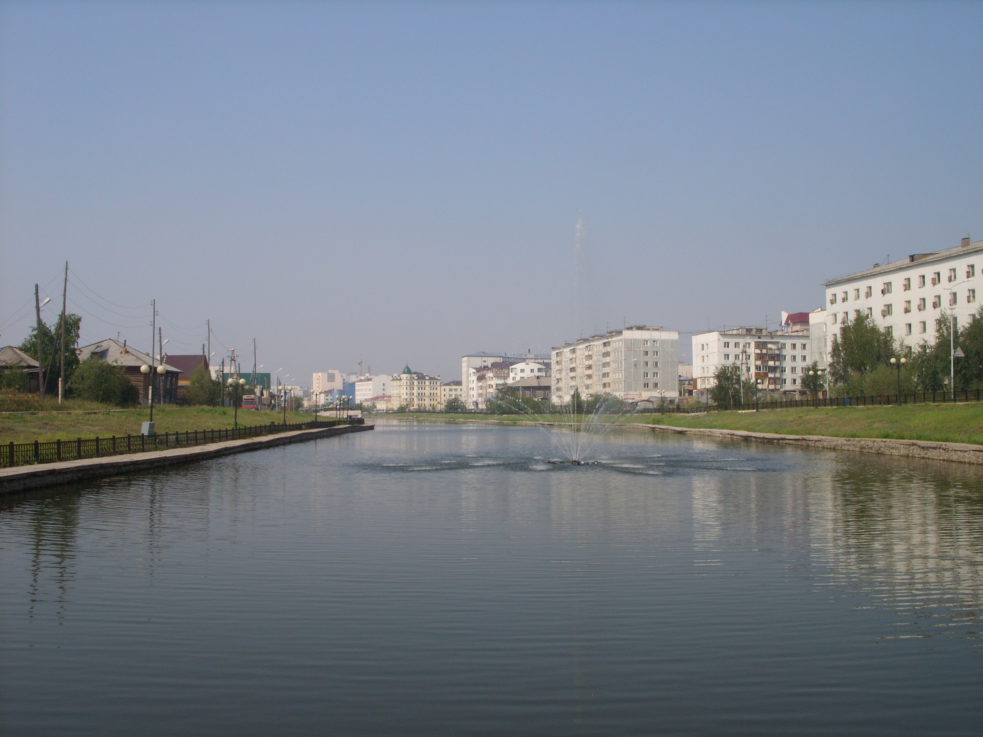 Взгляд от первого универсама. Справа ул. Кулаковского